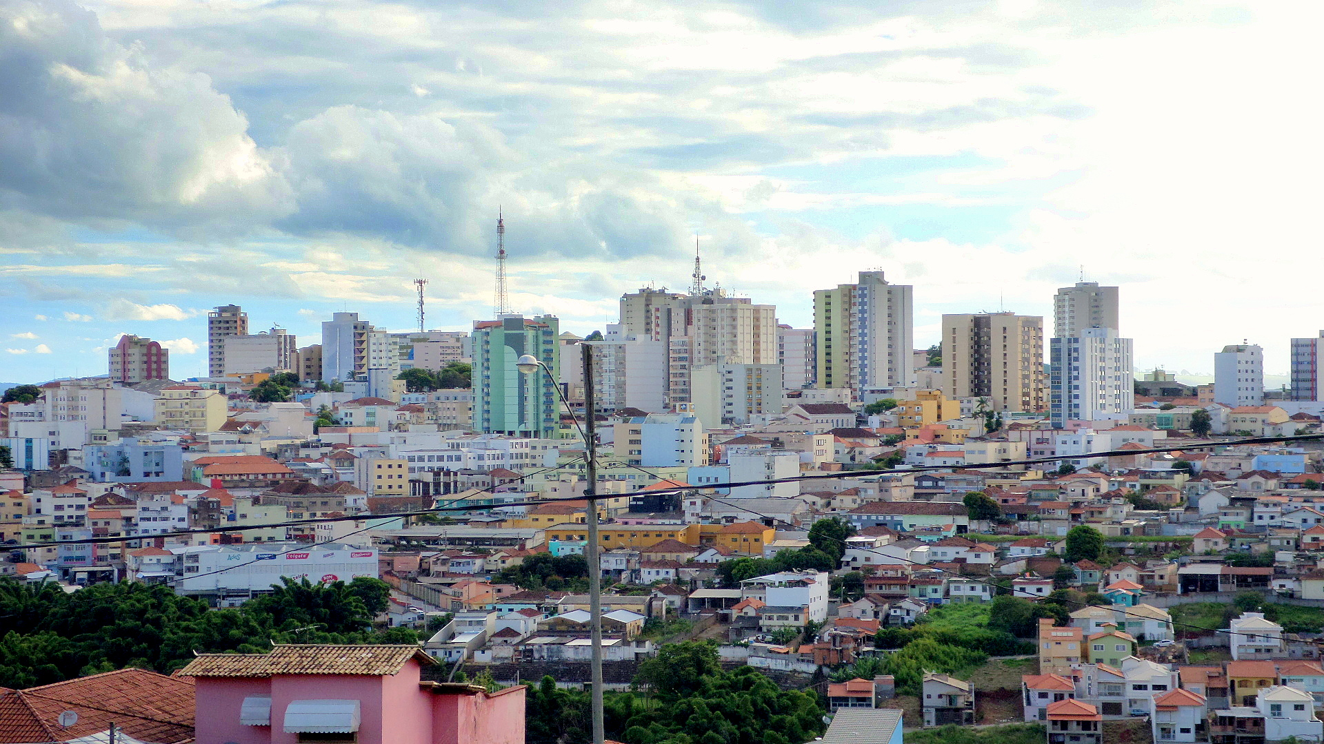 Vista de Varginha